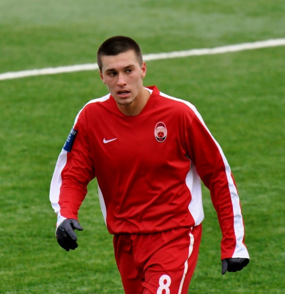 Михайло Цакич — сербский футболист